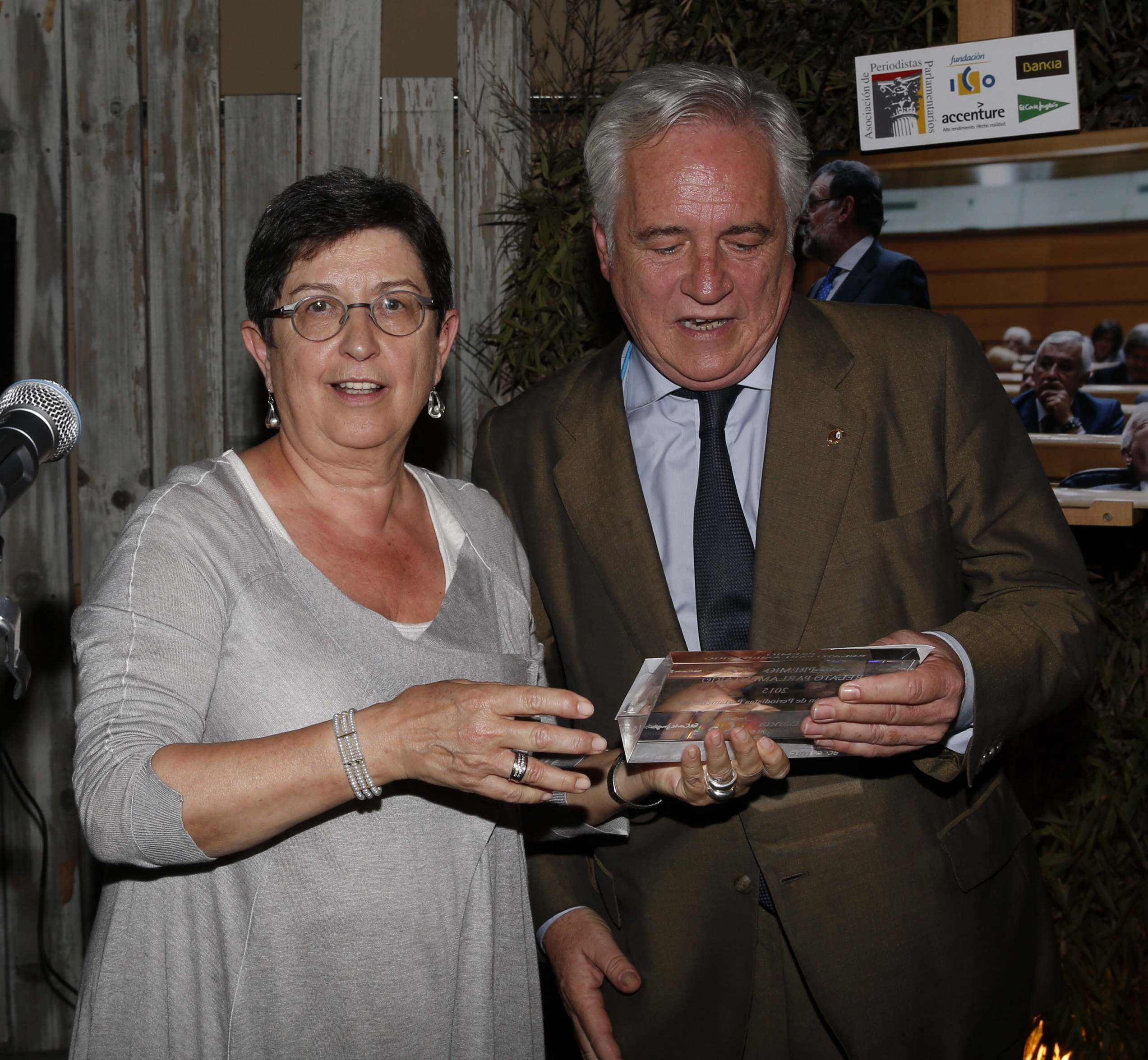 Ganador Relatos Parlamentarios 2015 Joaquín Luis Ramírez Rodríguez